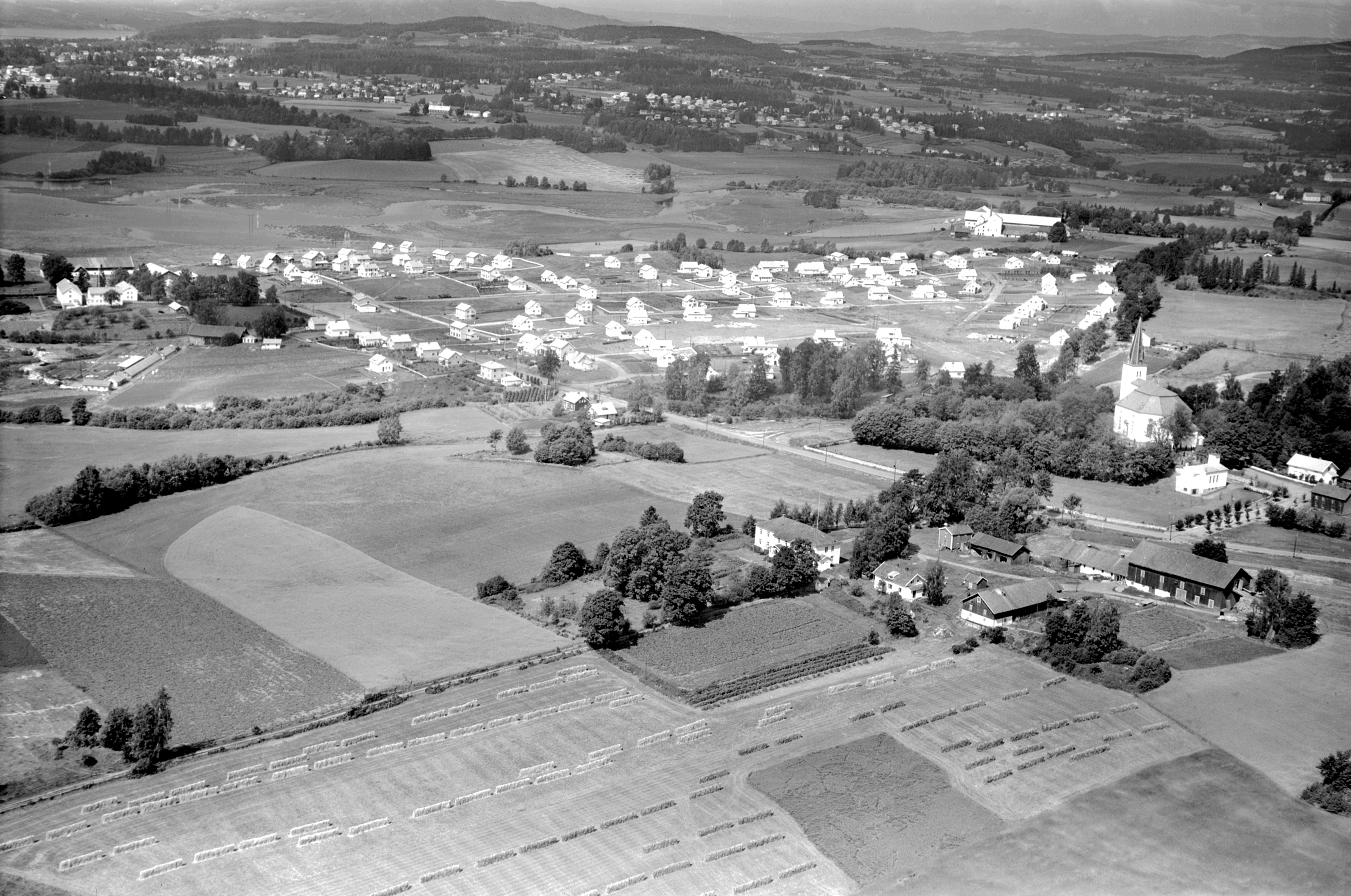 Flyfoto av Vang kirkegård og kirke i Ridabu, 1956. Ukjent fotograf for Widerøe Flyveselskap. Fra Domkirkeoddens fotoarkiv i Digitalt museum